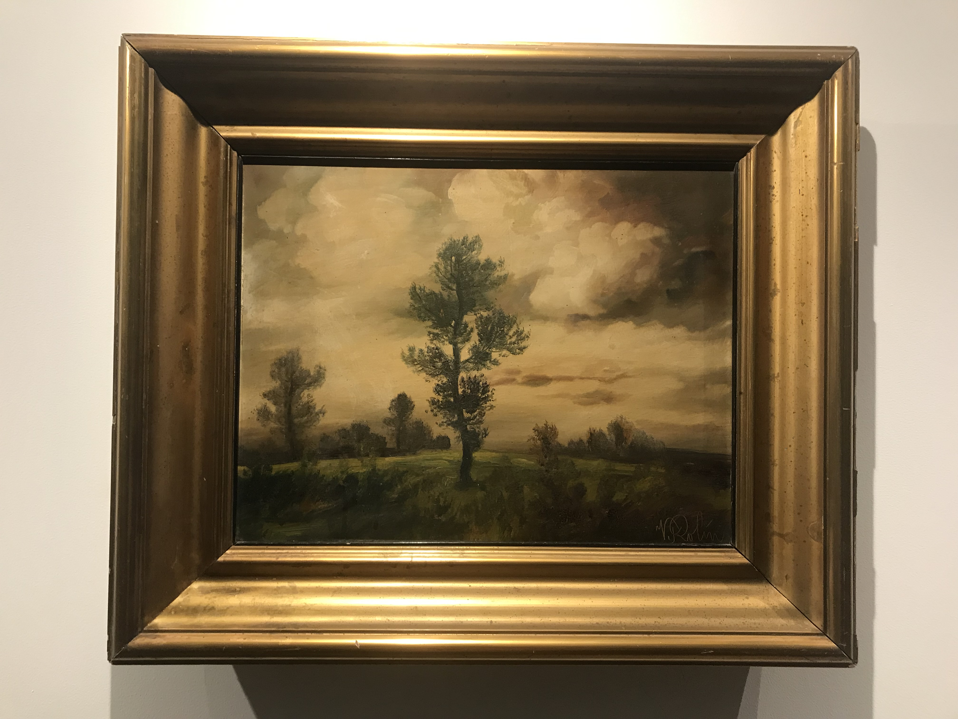 Viktor Rolín Krajina pred búrkou.